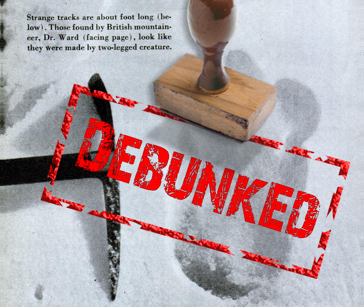 Foto descrivente il debunking della presunta impronta di uno Yeti.